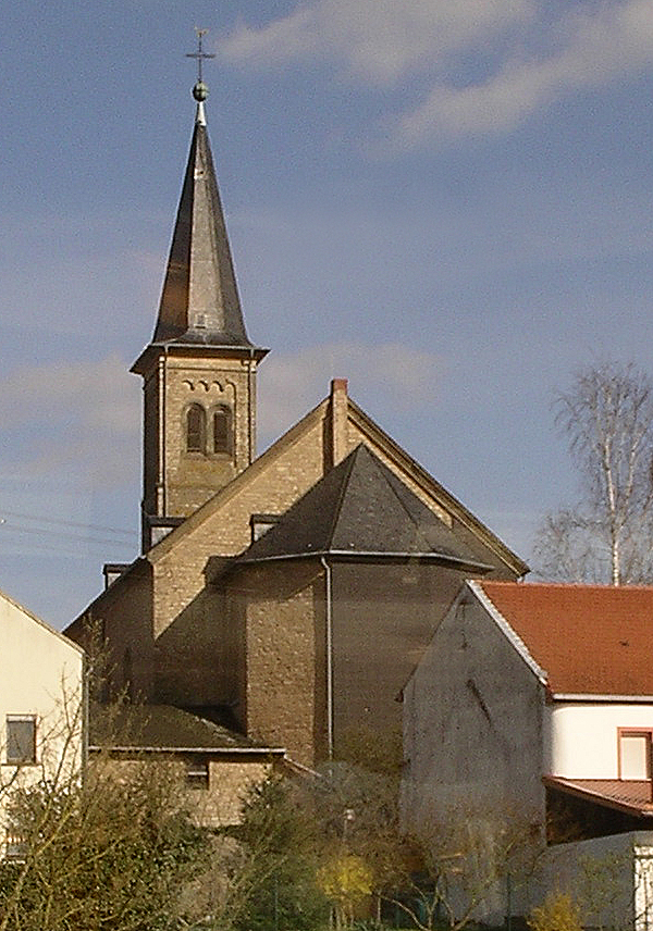 Perl, Besch von der Mosel her gesehen